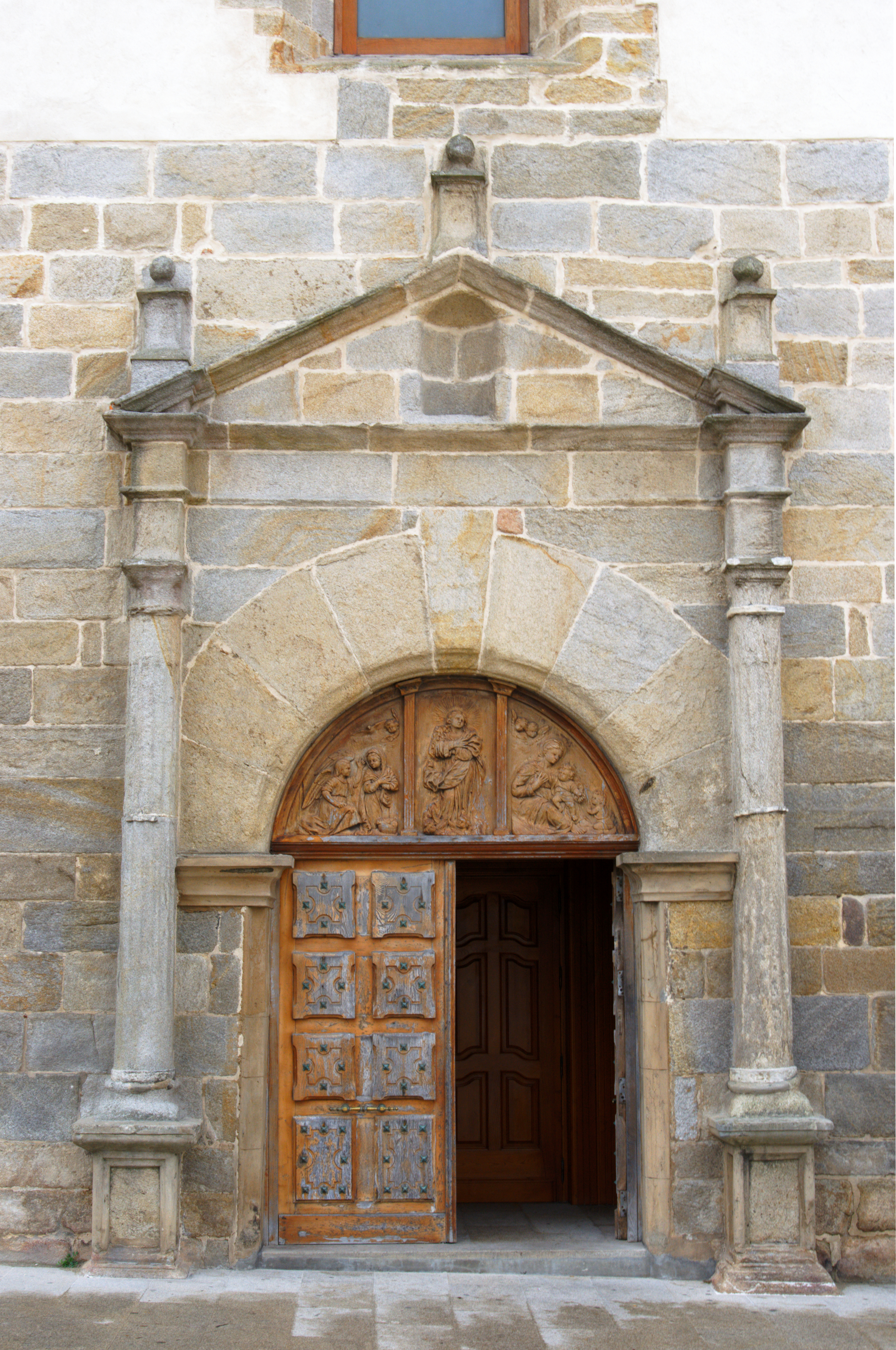 Caión, Convento de los Agustinos